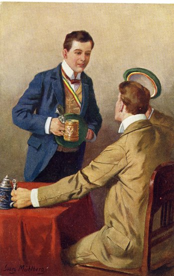 „Schmollis antragend“ (um 1900). Ein Verbindungsstudent in Couleur bietet einem anderen das "Schmollis" an, weil er sich mit ihm in Zukunft duzen möchte. Die Szene findet vermutlich im inoffiziellen Teil einer Kneipe statt.